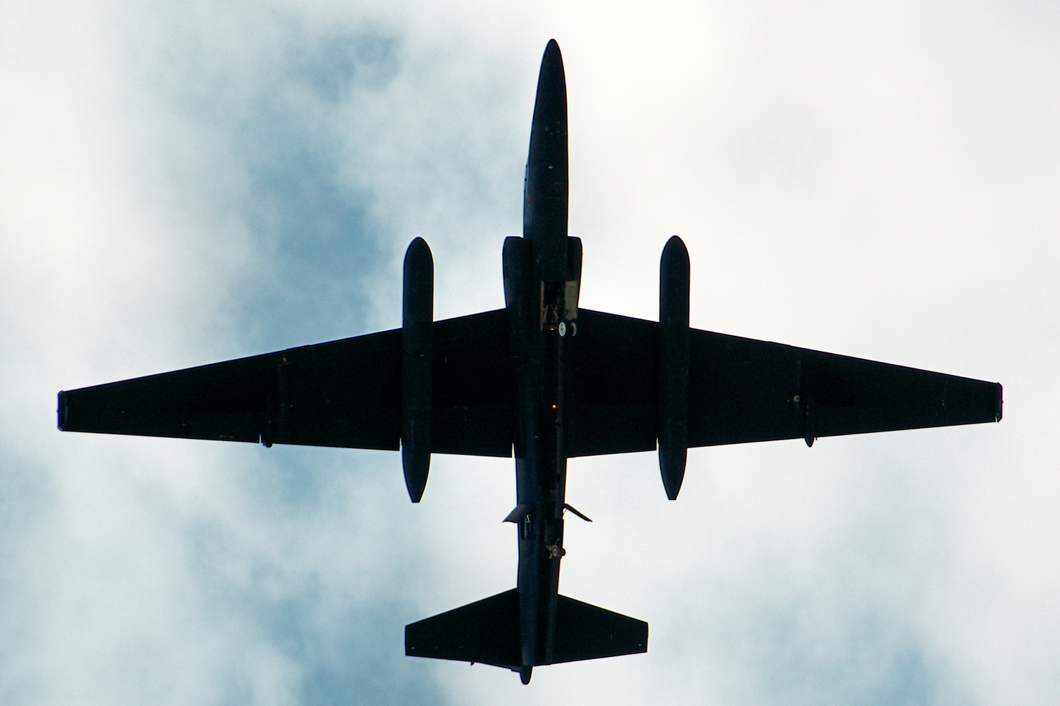 U2 - RIAT 2017